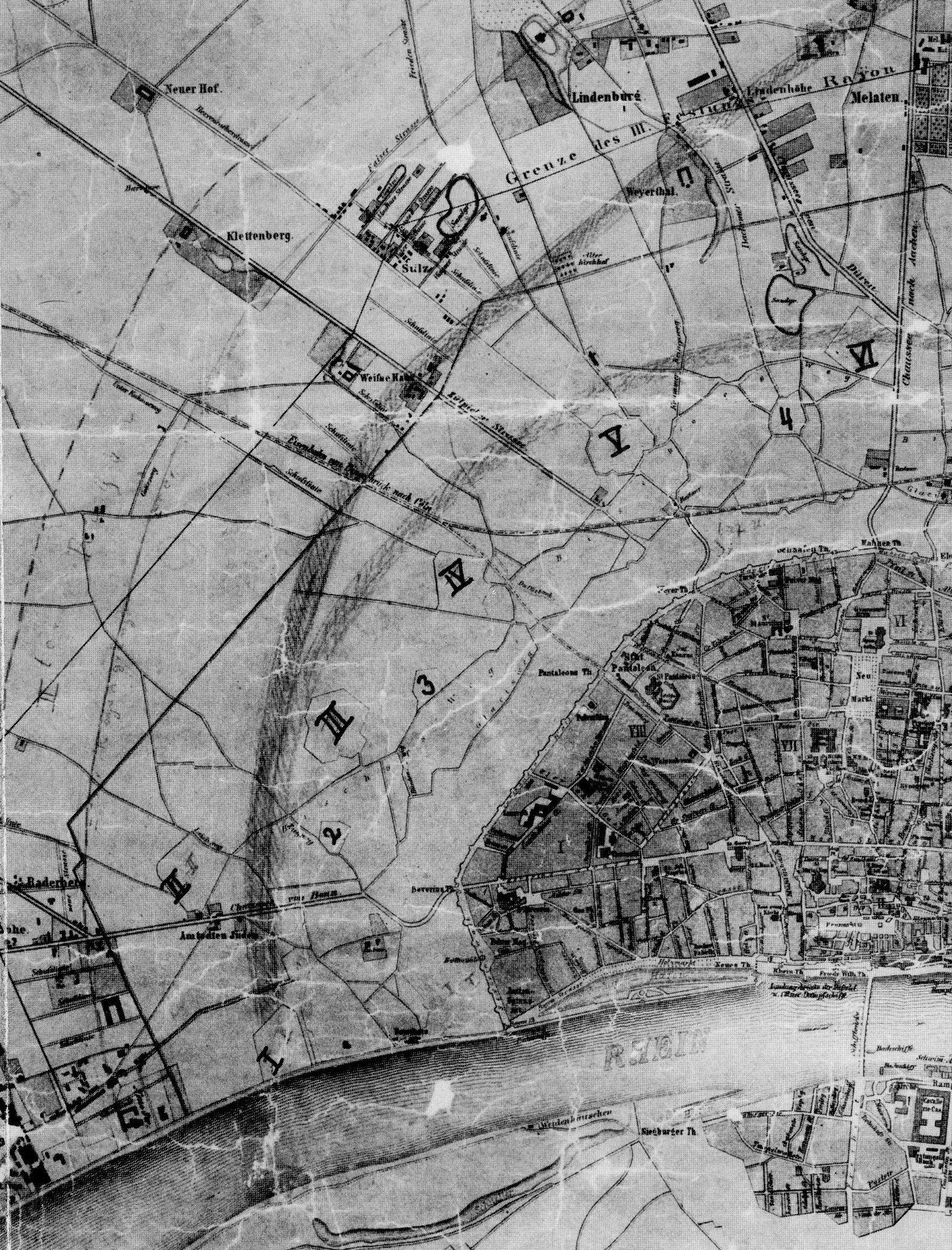 Köln und Umgebung im Jahr 1874. Ausschnitt der Karte 1 mit Einbeziehung der Rayongrenzen und der projektierten vorderen und weiteren Umwallung